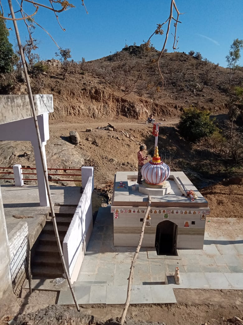 देवनिया महादेव मंदिर, सकालदा